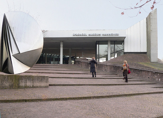 Sprengel Museum Hannover /sculpture 5/80 by Erich Hauser Foto aufgenommen von Benutzer Benutzer:Axel Hindemith, Dezember 2005